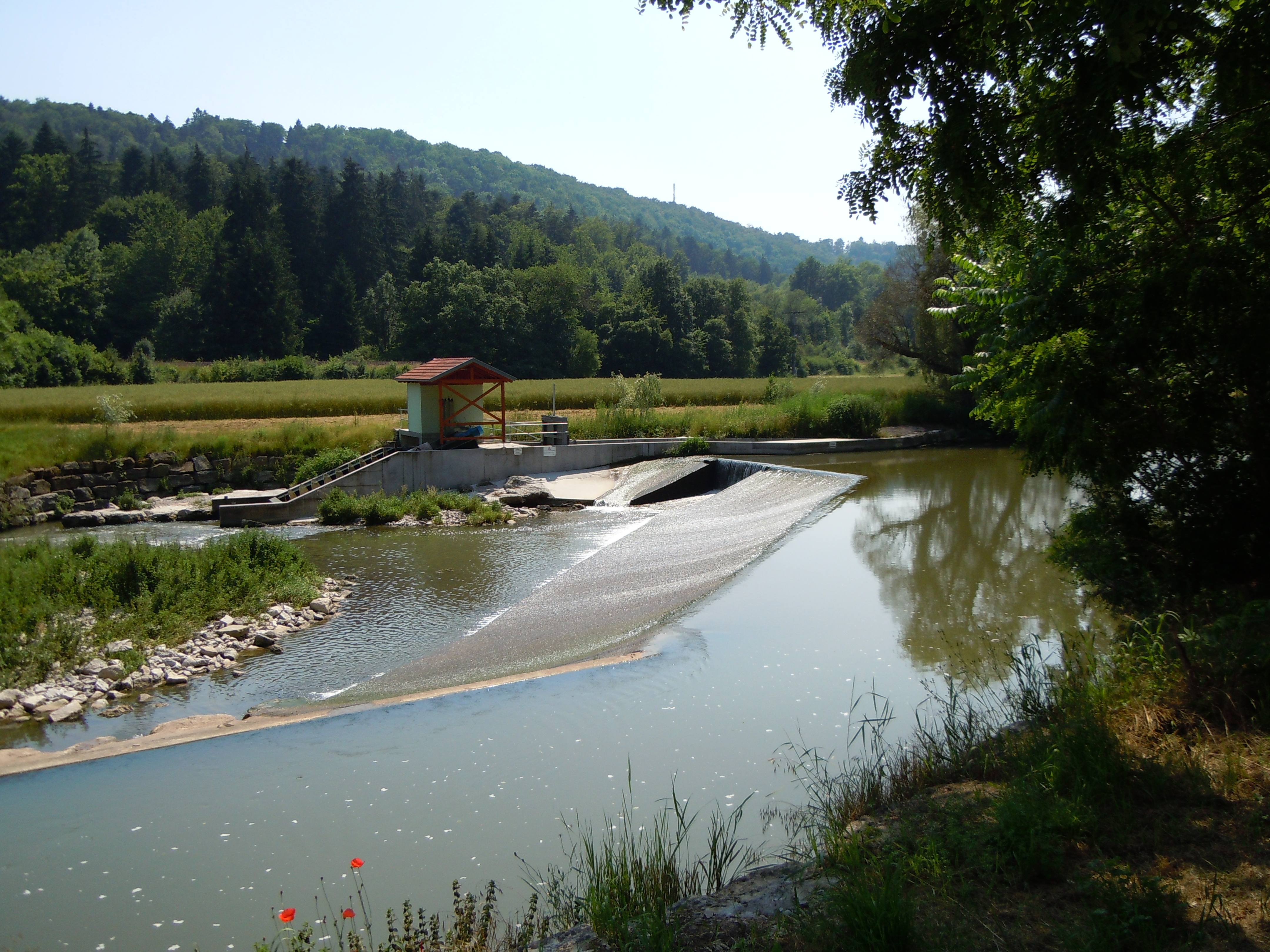 Streichwehr, Mühlen am Neckar, Wohnplatz Säge, Abgang Sägekanal (vorne)